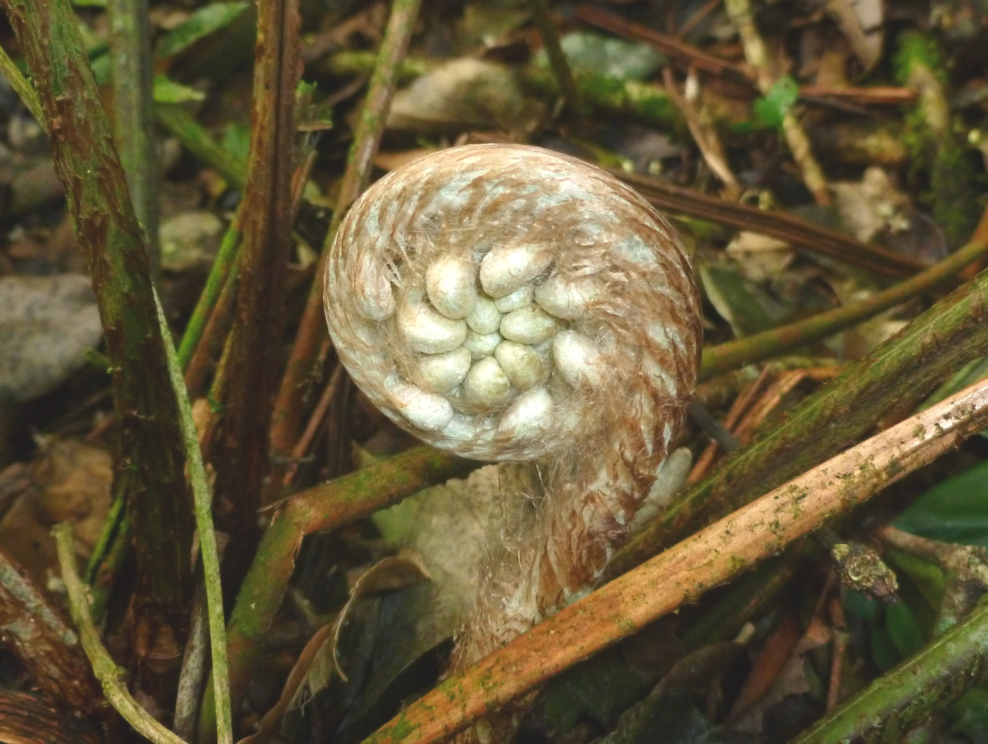 BACULO DE HELECHO ARBORESCENTE de los ESTEROS DEL IBERA ( el segundo mayor humedal del mundo,) provincia de Corrientes, Argentina.